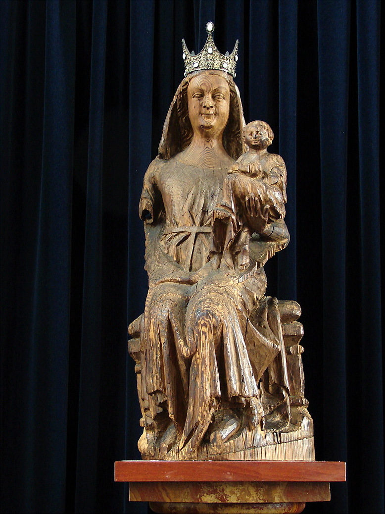 Madonna med barnet i den Katolske Kirke, Reykjavik i Island